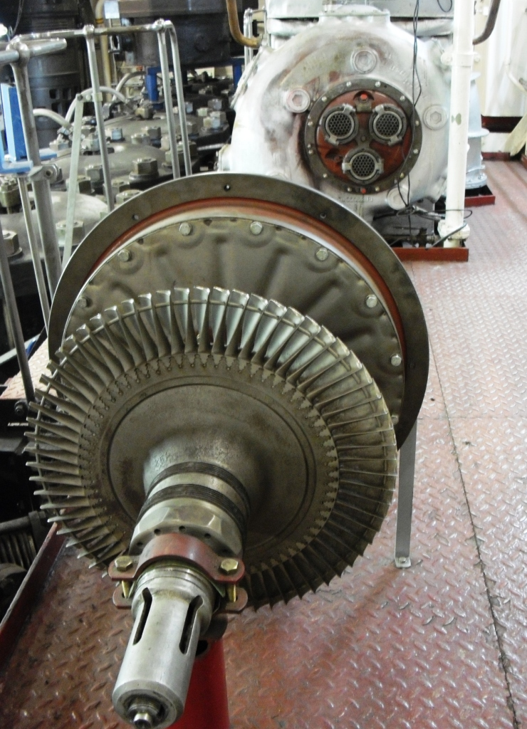 Rotor des Abgasturboladers